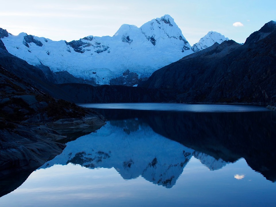 Fotografía tomada en mayo de 2019.